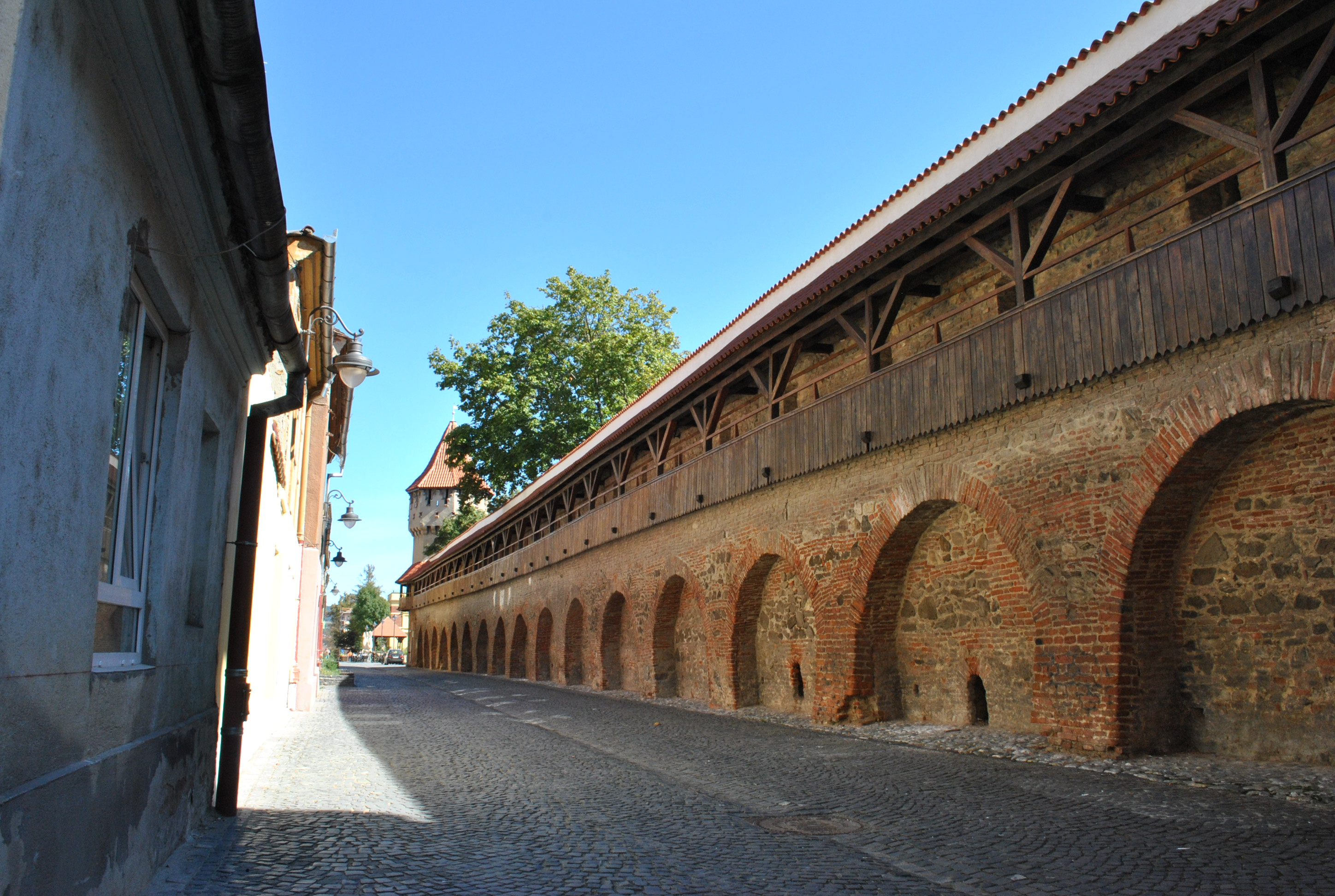 Incinta III: Turnuri de apărare, Turnul Dulgherilor, Turnul Olarilor, Turnul Archebuzierilor, Turn de Poartă, curtine, 1357 - 1366 03